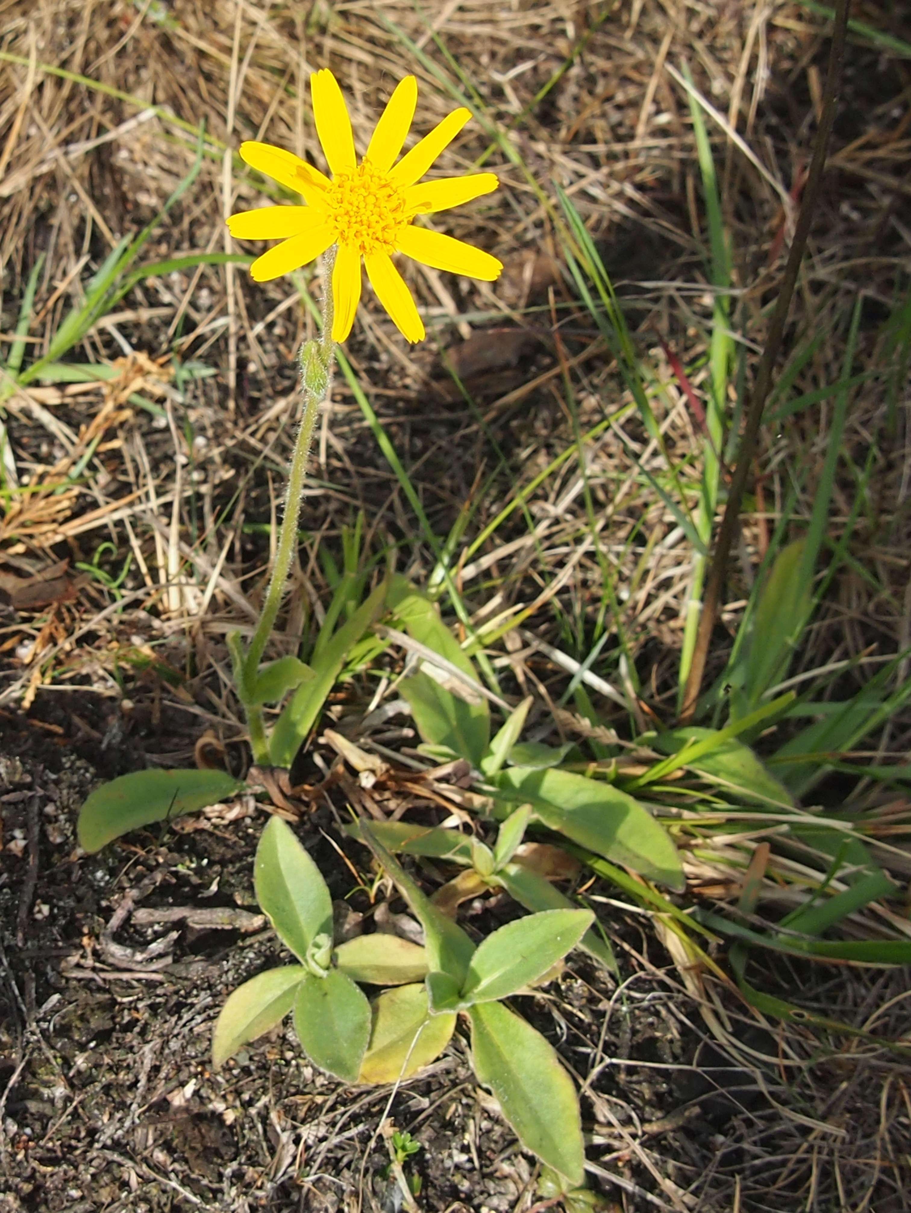 Arnica montana Blüte, Standort Naturpark Südheide, Niedersachsen